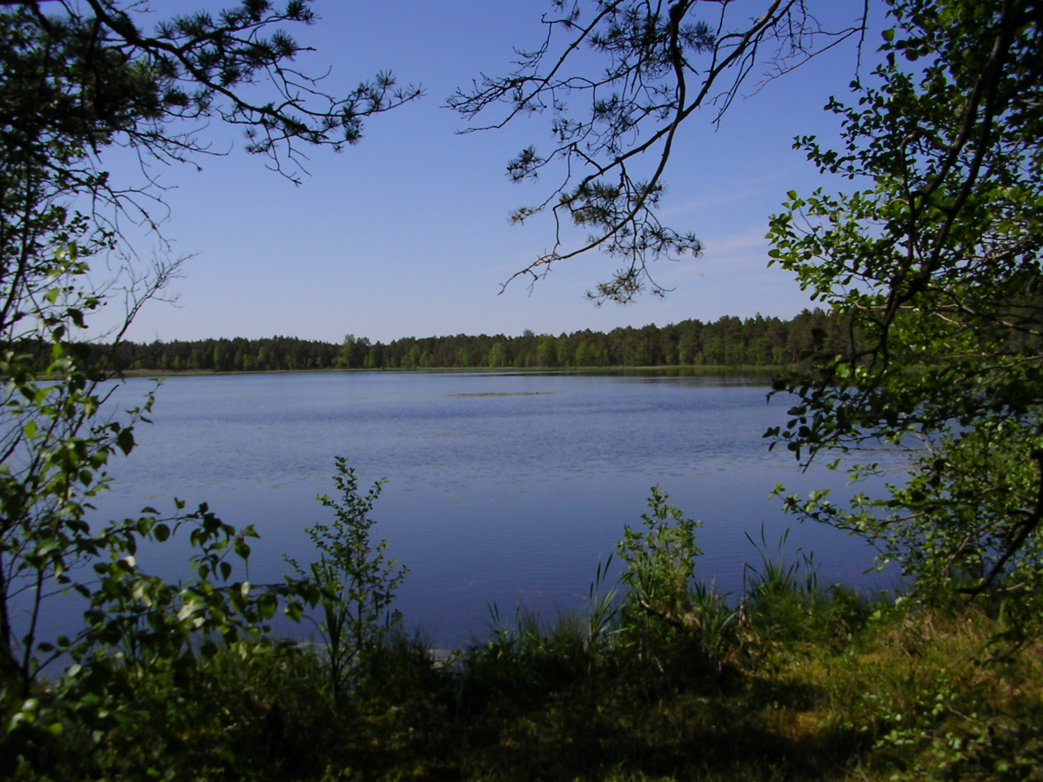 Männikjärv